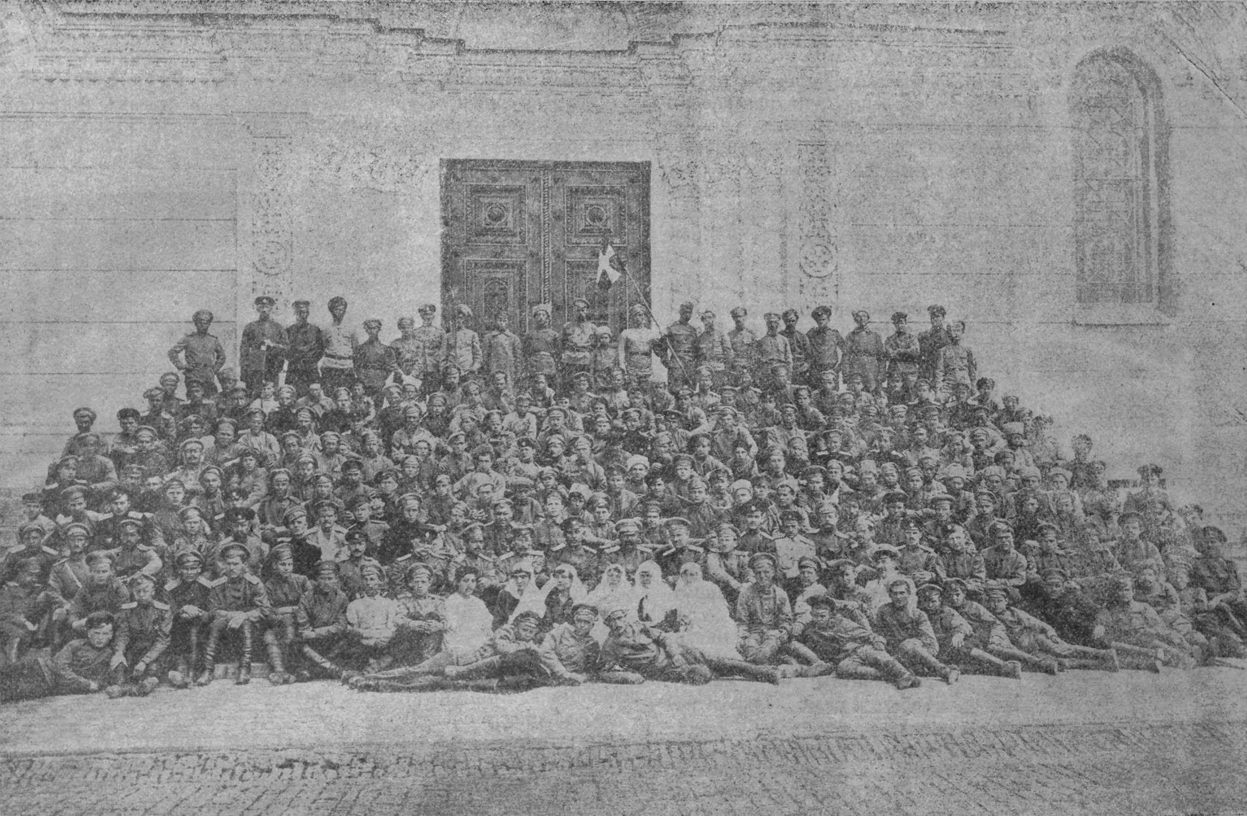 «Возвращение степных орлов». В Новочеркасске на ступенях собора — партизаны, освободившие Дон от Красной армии. В центре — походный атаман ген. П. Х. Попов, слева — ген. Э. Ф. Семилетов, справа — ген. В. И. Сидорин.